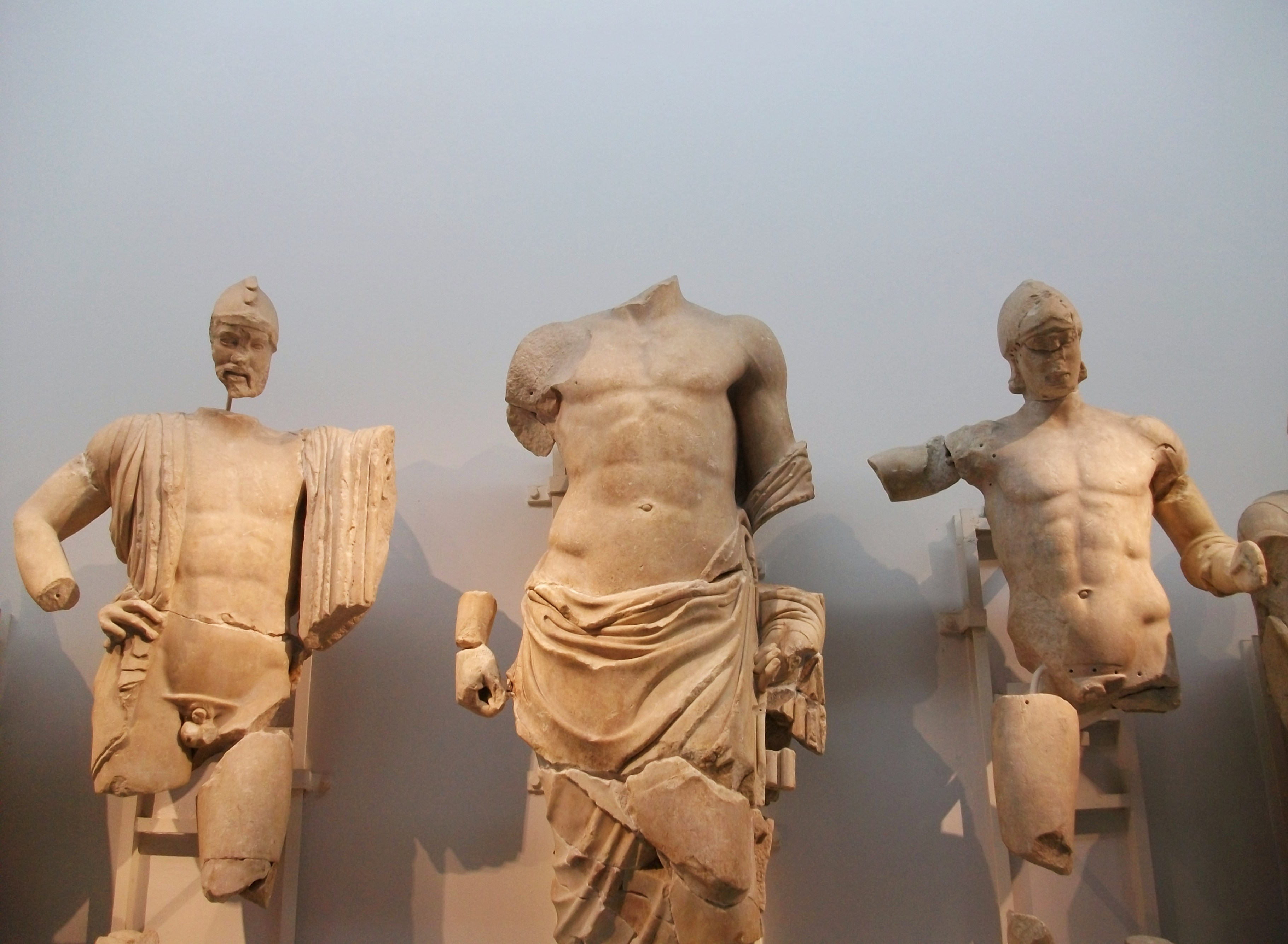 Part central del frontó oriental del temple de Zeus a Olímpia. D'esquerra a dreta, Enomau, Zeus i Pèlops.